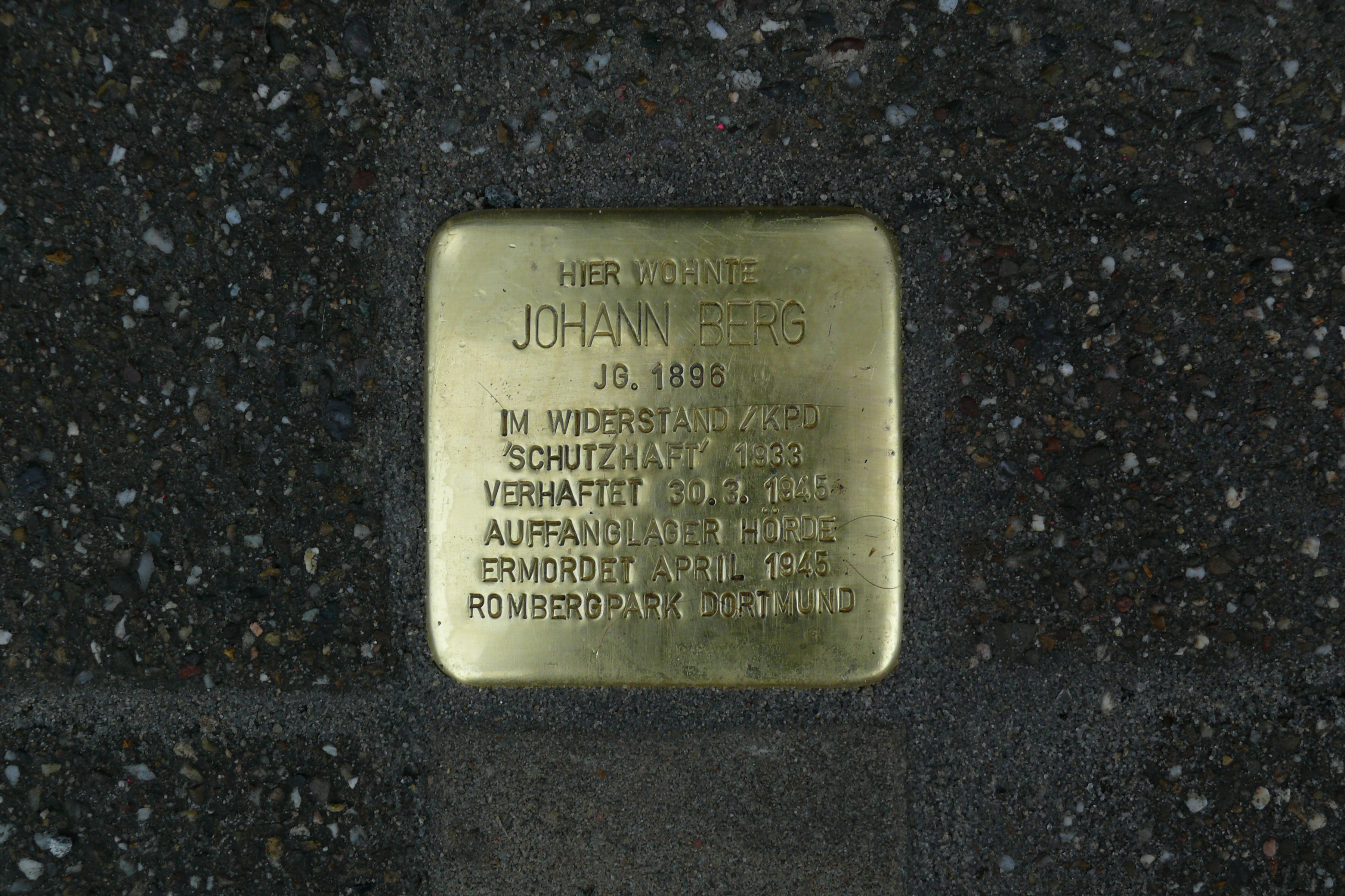 Johann Berg, 2019